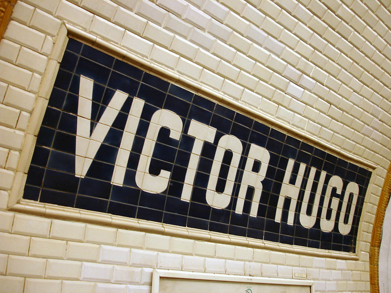 Station Victor Hugo de la ligne 2 du métro de Paris, France.